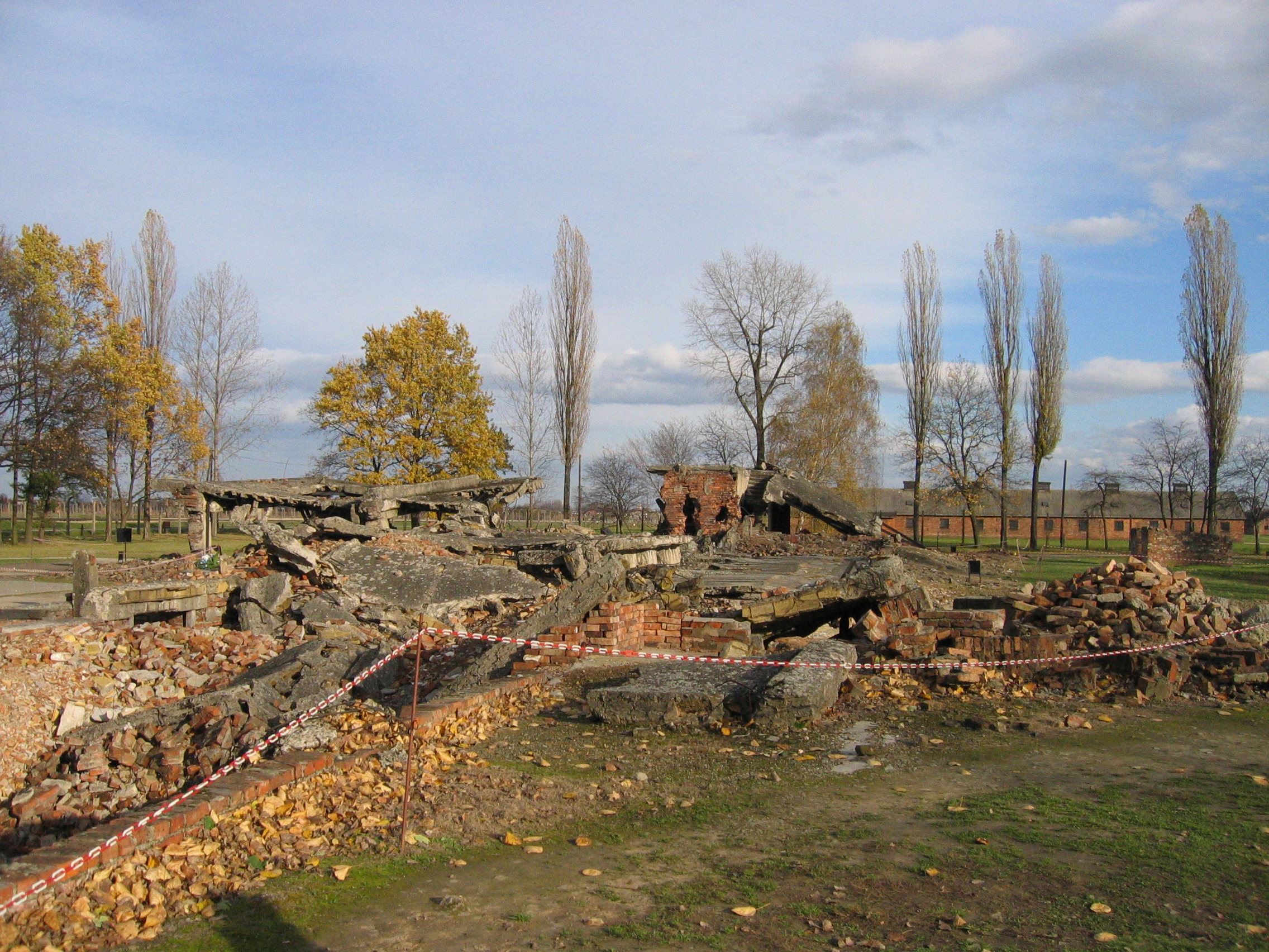 Überreste von Krematorium II in Birkenau (Gaskammer im Stammlager als I gezählt)